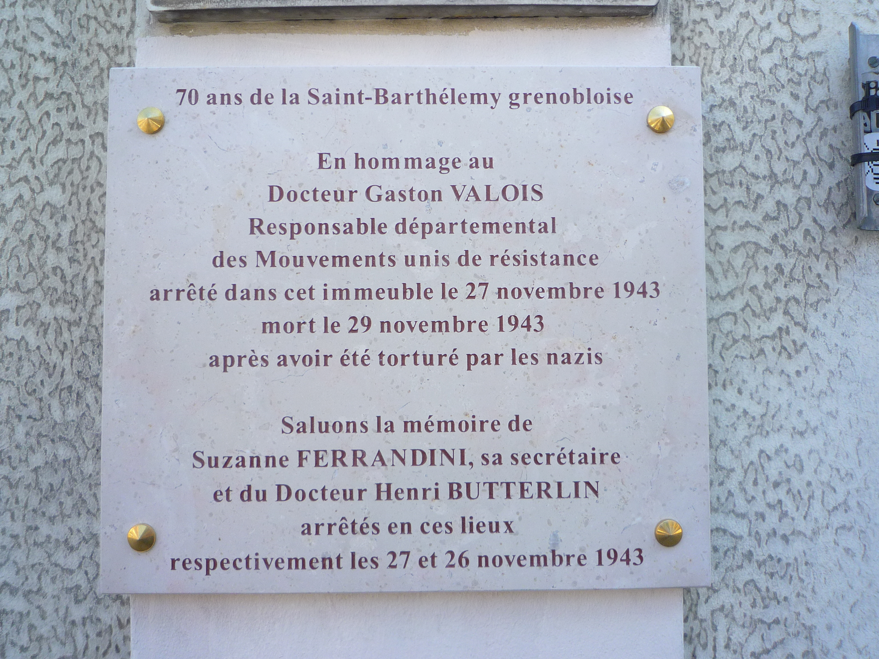 Plaque 5 rue Palanka à Grenoble : 70e anniversaire de la Saint-Barthélemy grenobloise.